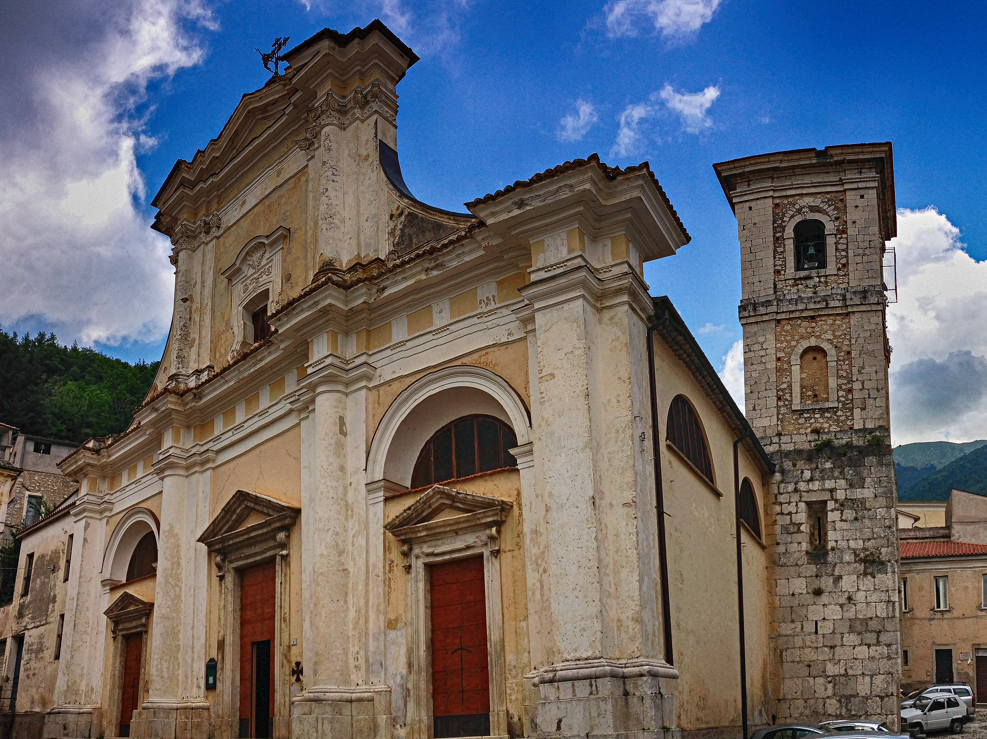 Chiesa di Santa Maria e San Marcello